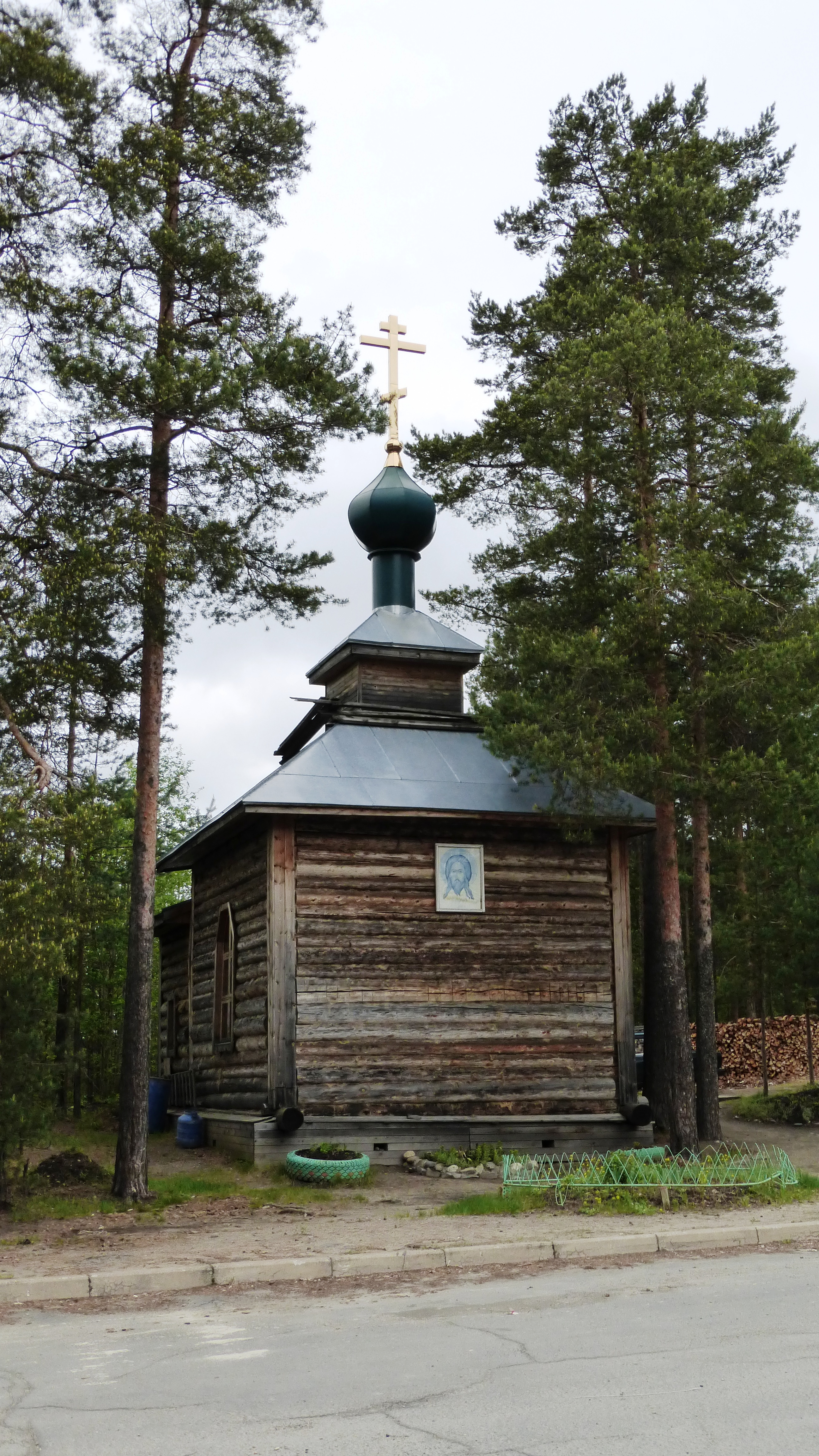 Часовня равноапостальных царя Константина и матери его царицы Елены на Петрозаводском городском кладбище "Бесовец". Построена в 2001-2002 годах.